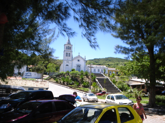 Capela da praça do centro histórico de garopaba - SC - Brasil Church in the historical center of Garopaba city, Santa Catarina State, Brazil